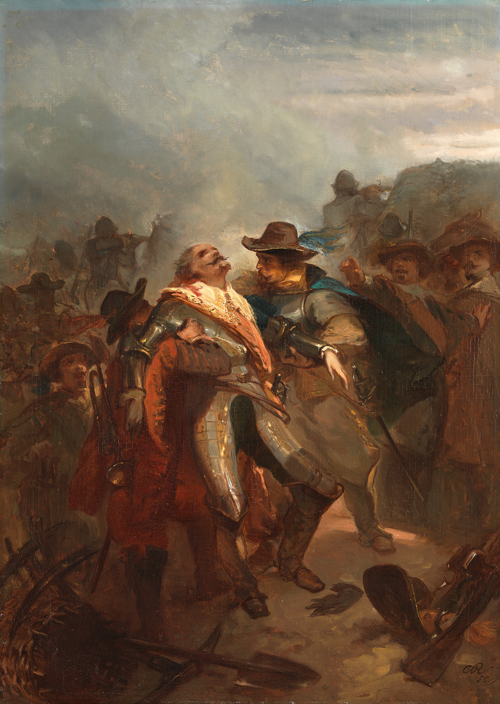 schilderij; tachtigjarige oorlog; Vos, Jacob de; geschiedenis (iconografie)